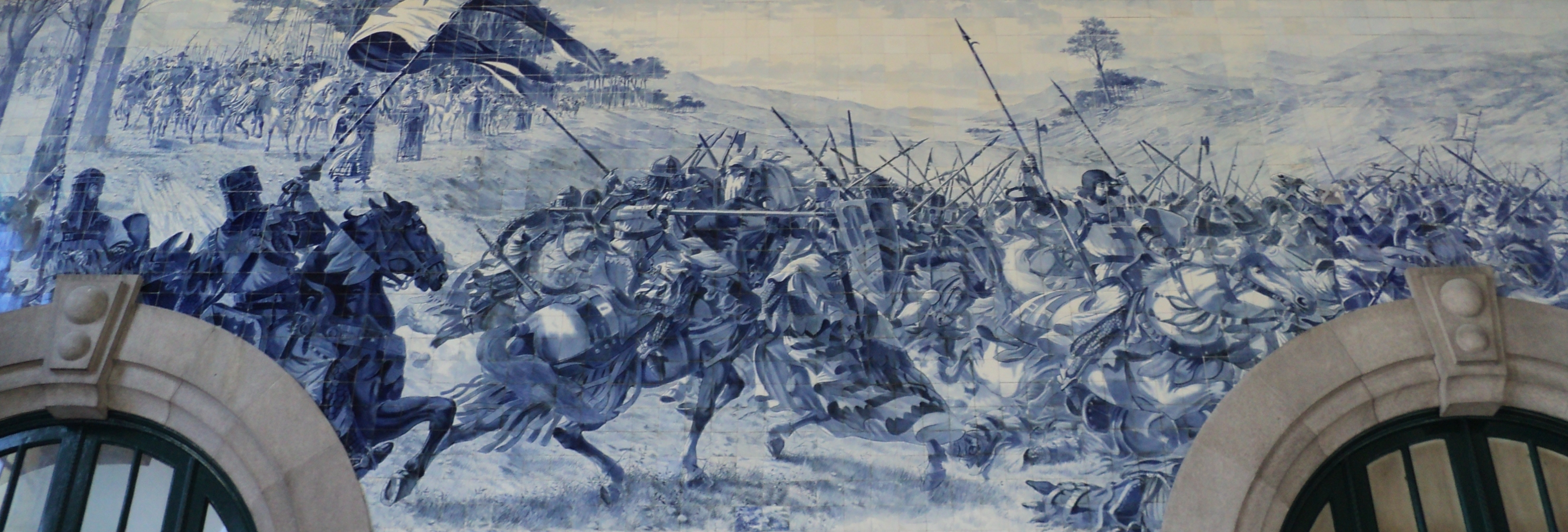 Panneau d'azulejos à la gare ferroviaire de São Bento, Porto, Portugal